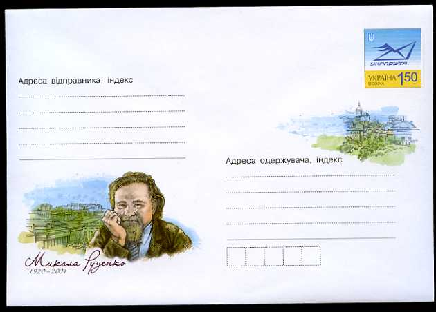 Почтовый конверт к 90-й годовщине со дня рождения Николая Руденко. Укрпочта.2010